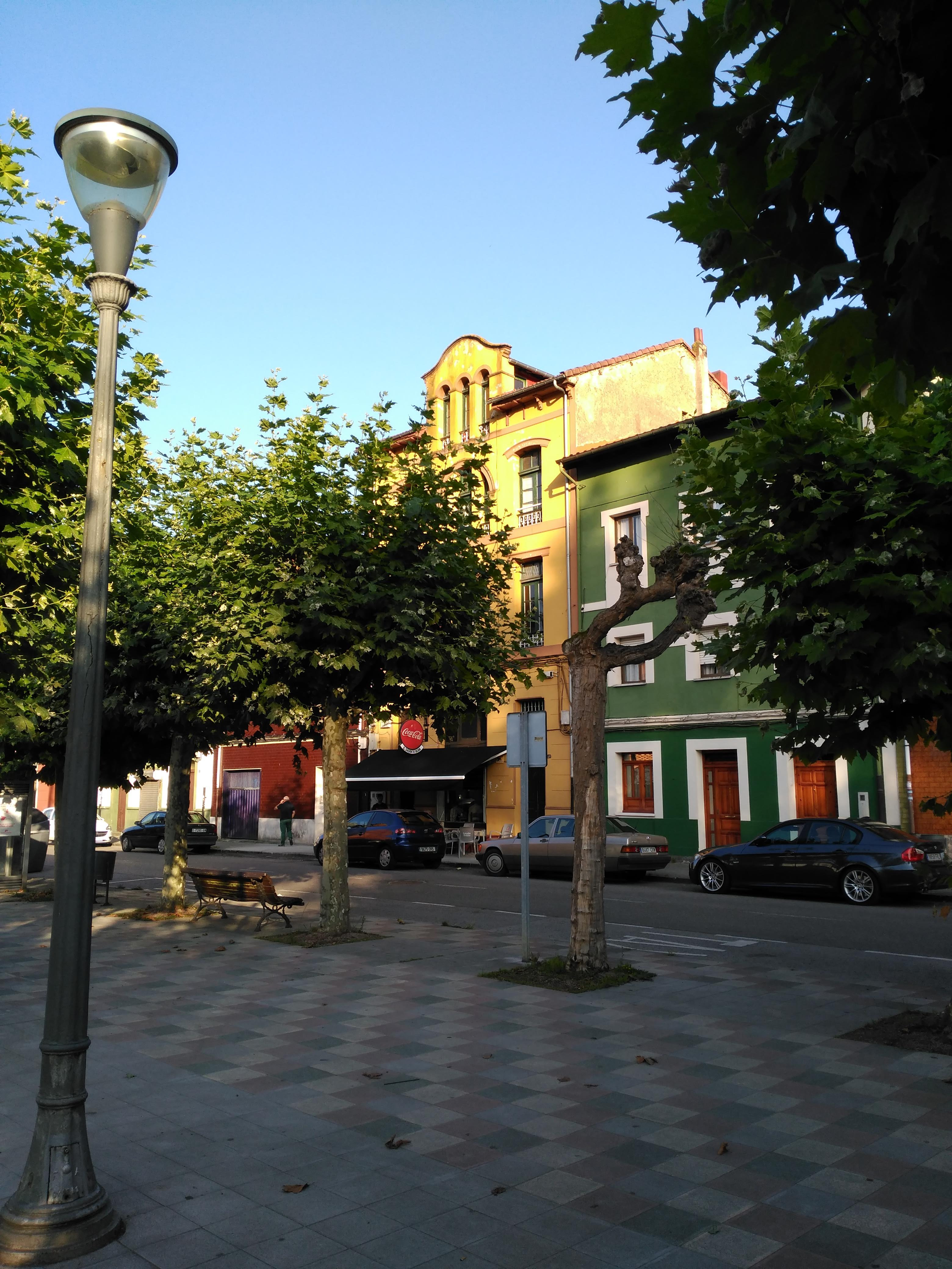 Parque público en la parroquia de Lada, Langreo (Asturias)